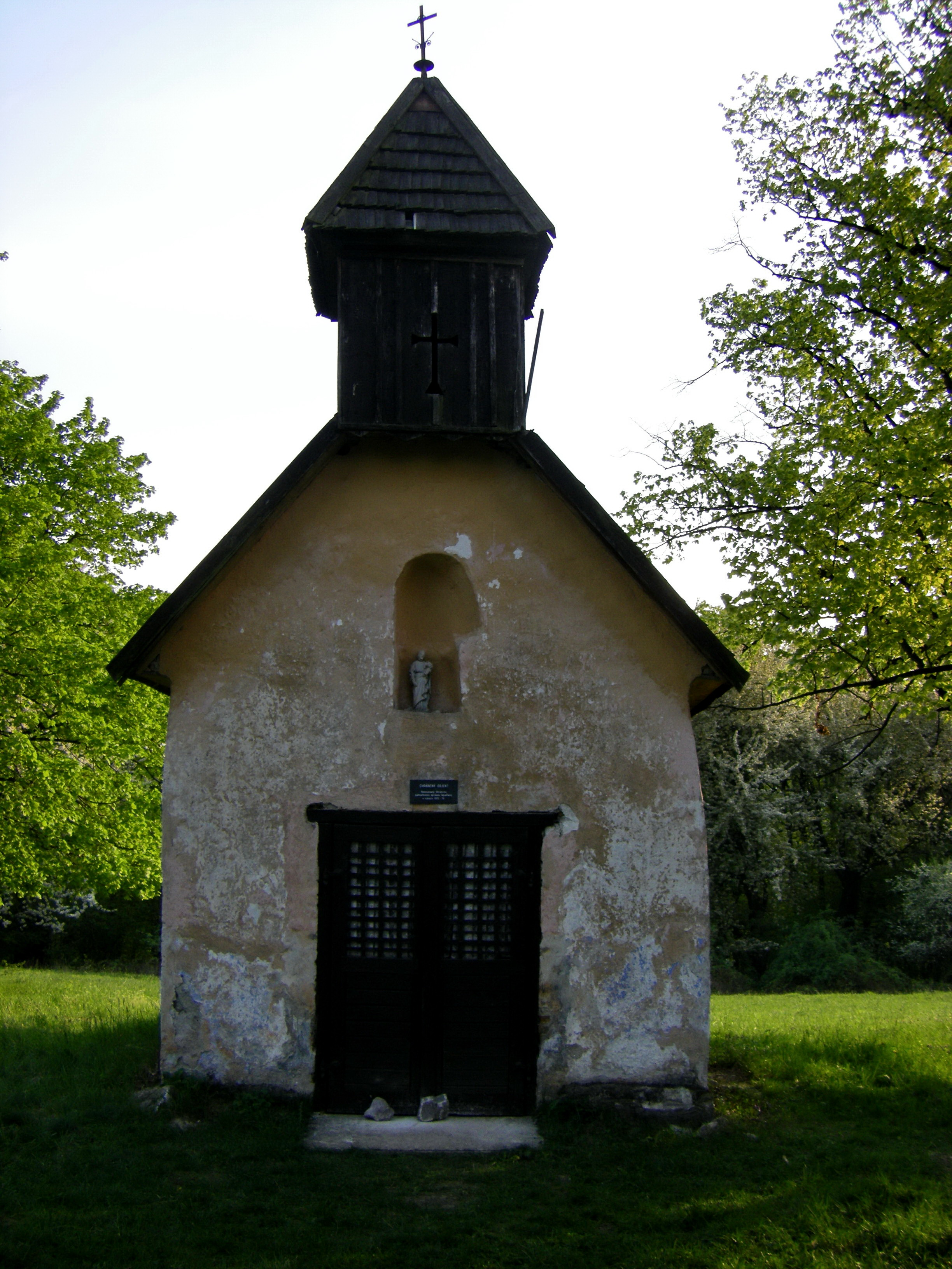 Kaplnka